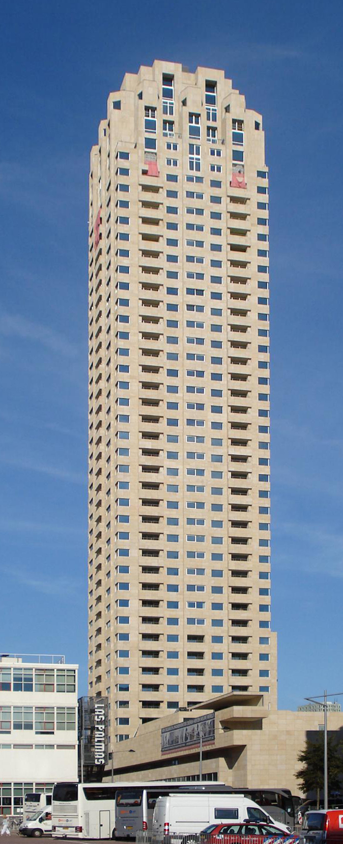 Rotterdam, woontoren New Orleans